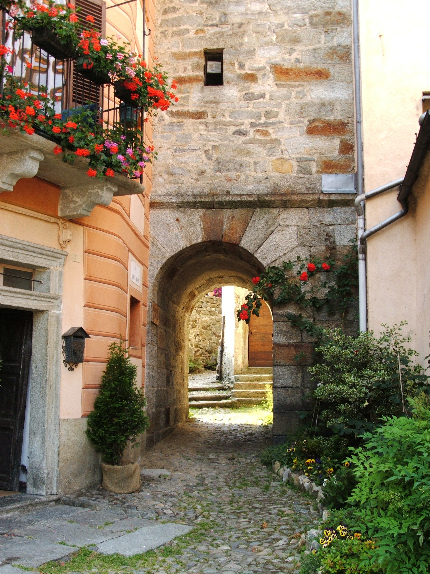 Piedicavallo, comune della Valle Cervo, provincia di Biella (Piemonte, Italia)